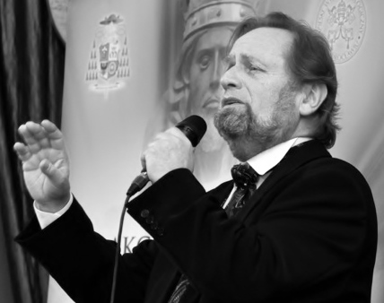 Włodzimierz Szomański (rok 2013).